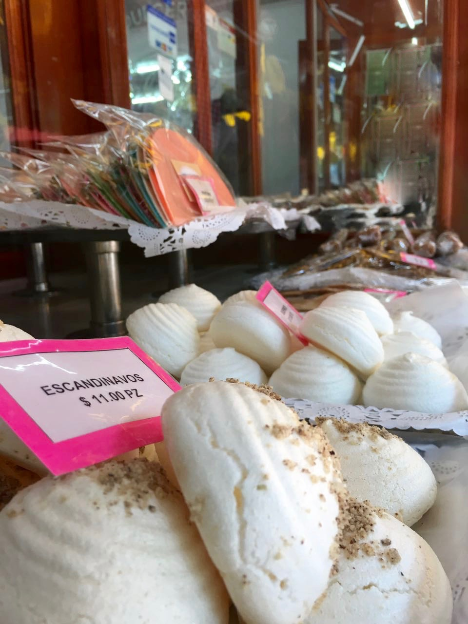 Escandinavos y otros dulces de la Dulcería de Celaya.